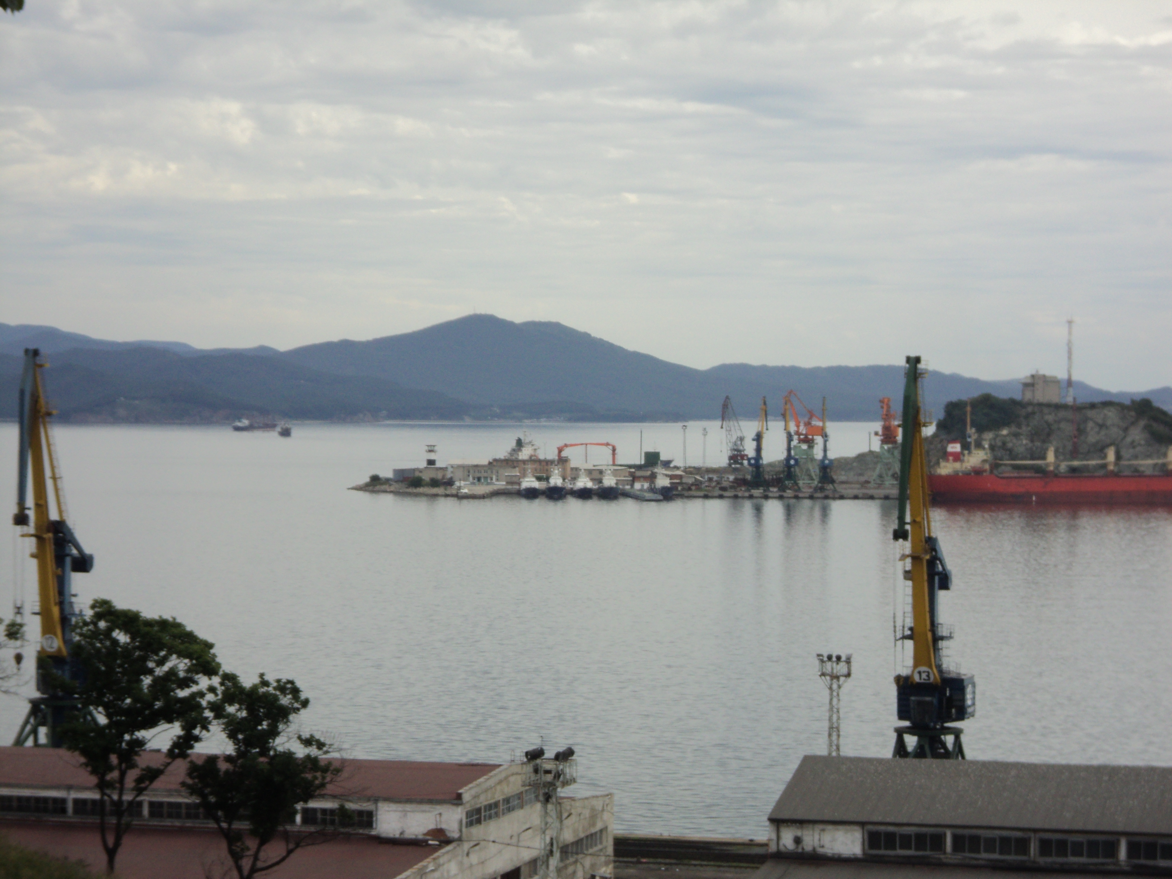 Вид на мыс Астафьева с сопки Тобольской